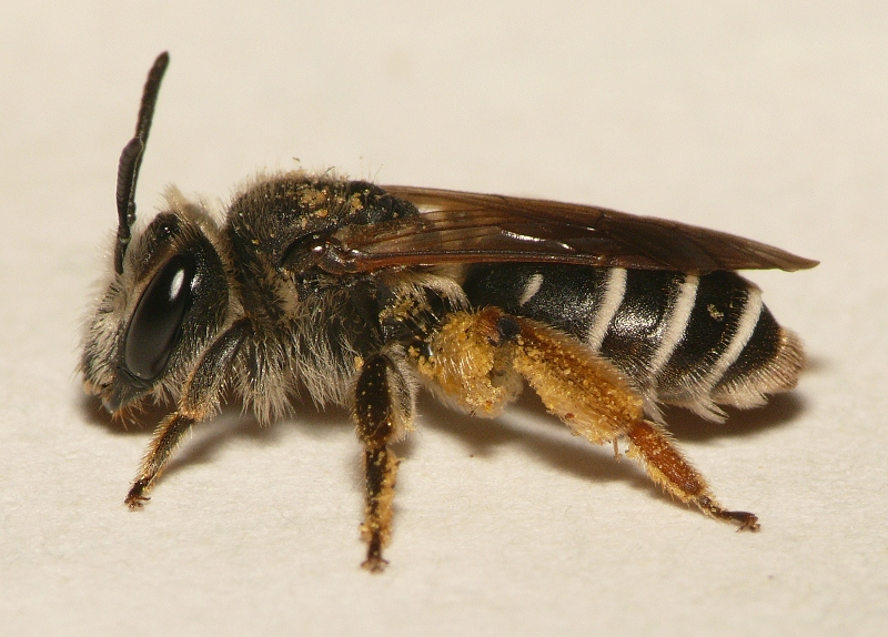 Andrena wilkella, female. Location: Rhenen - Blauwe Kamer - Gelderland (The Netherlands)